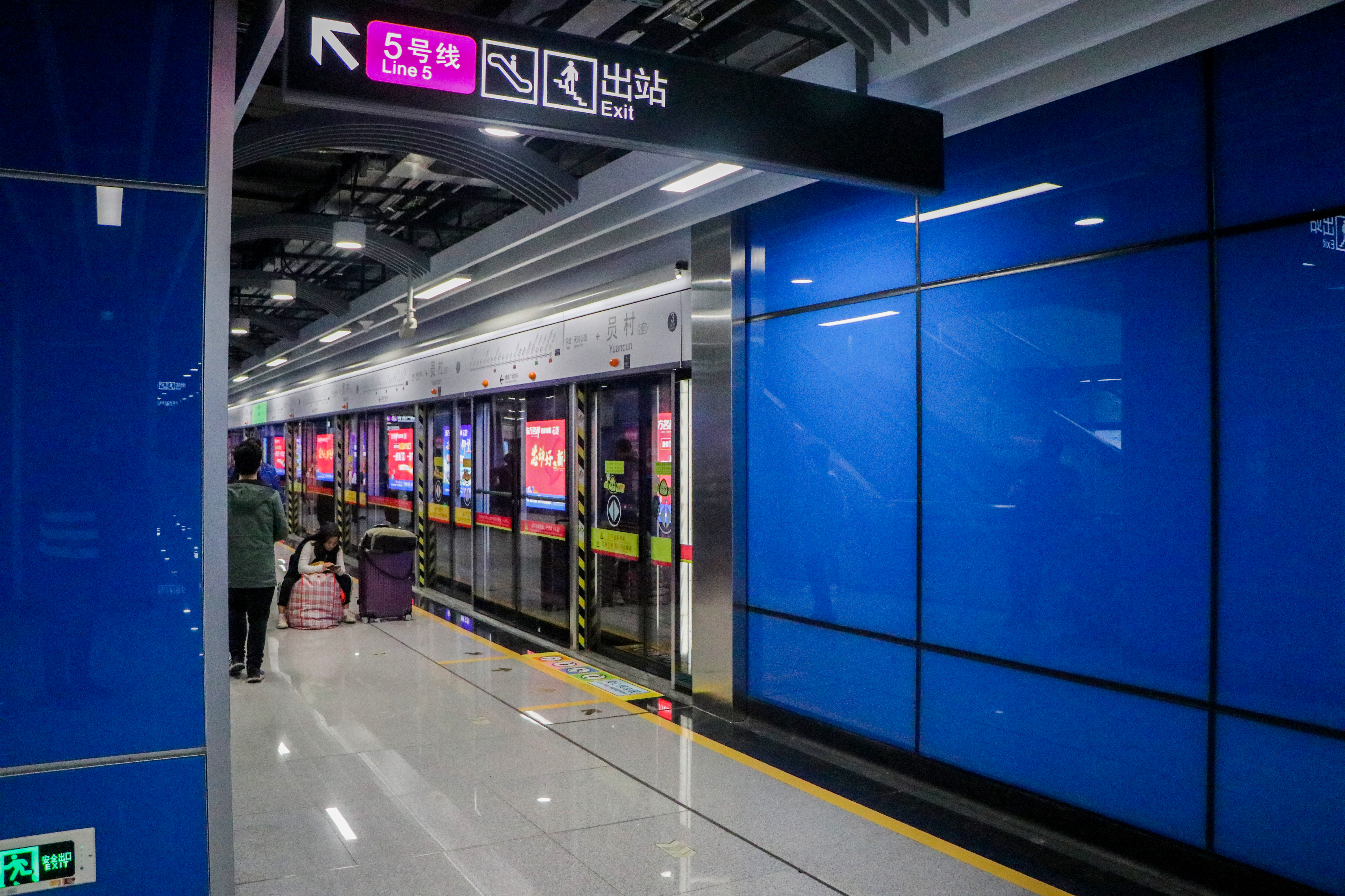 广州地铁员村站